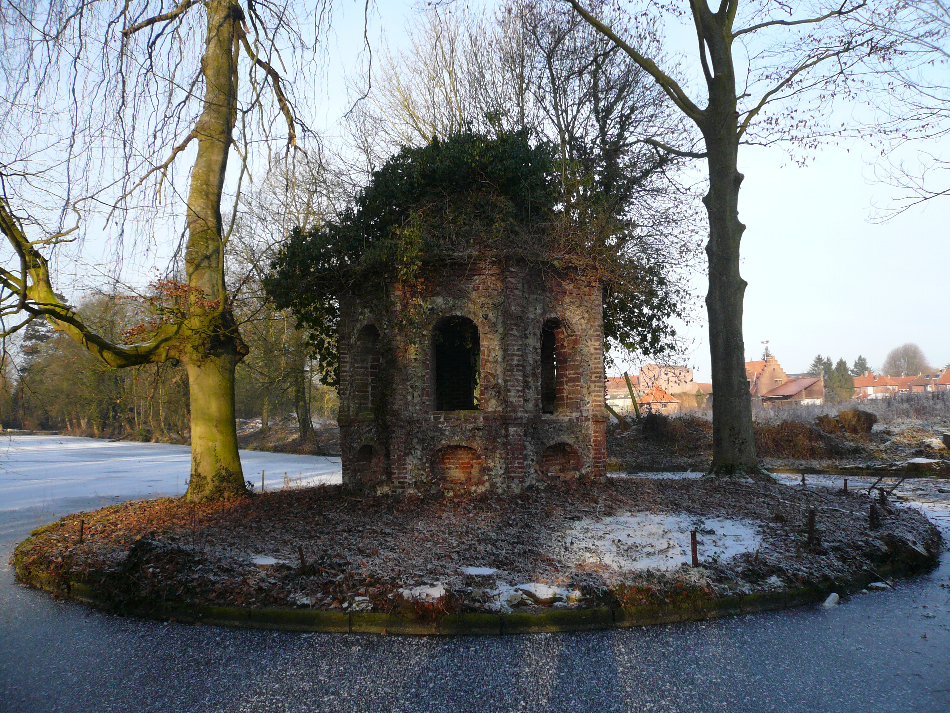 Chapelle devant le château de Cysoing